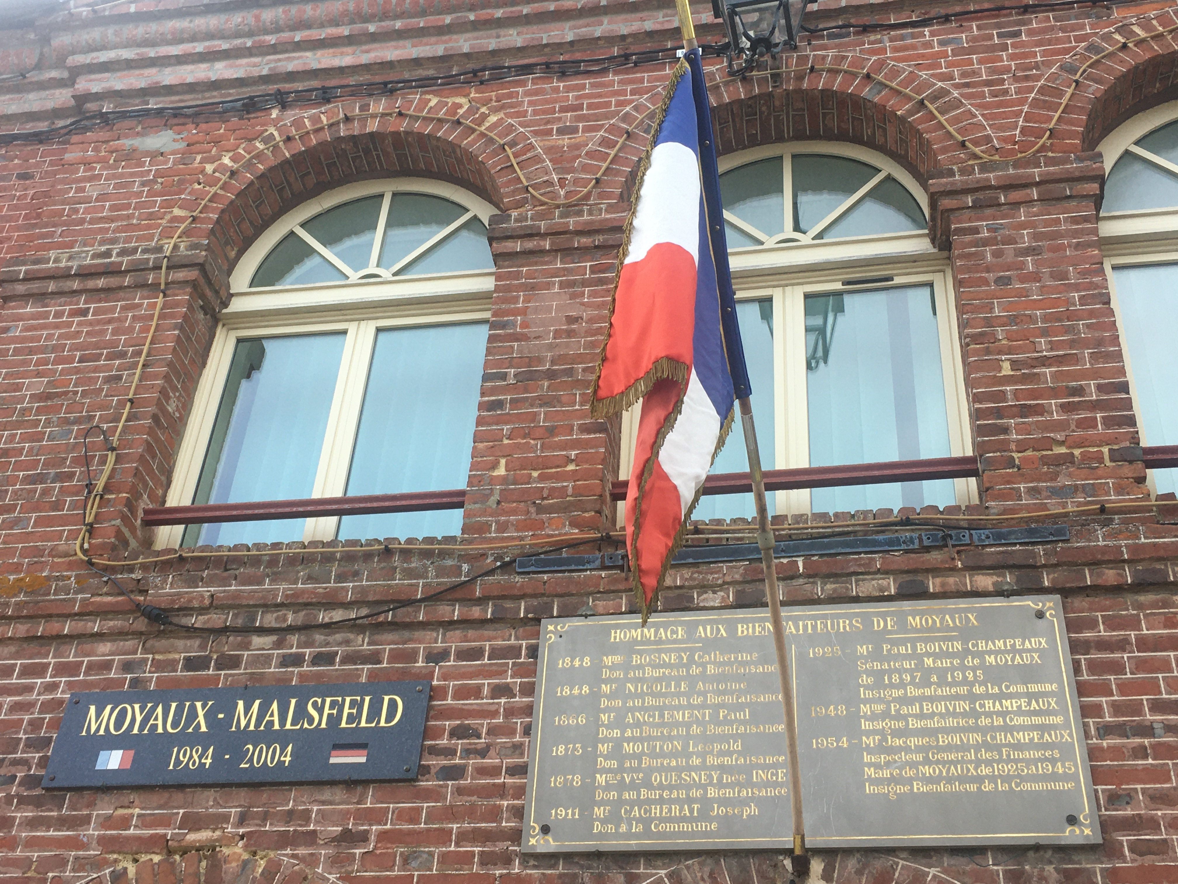 Moyaux (Calvados) : plaques de la mairie. Jumelage Moyaux-Malsfeld (1984-2004). Hommage aux bienfaiteurs de Moyaux (1848-1954).